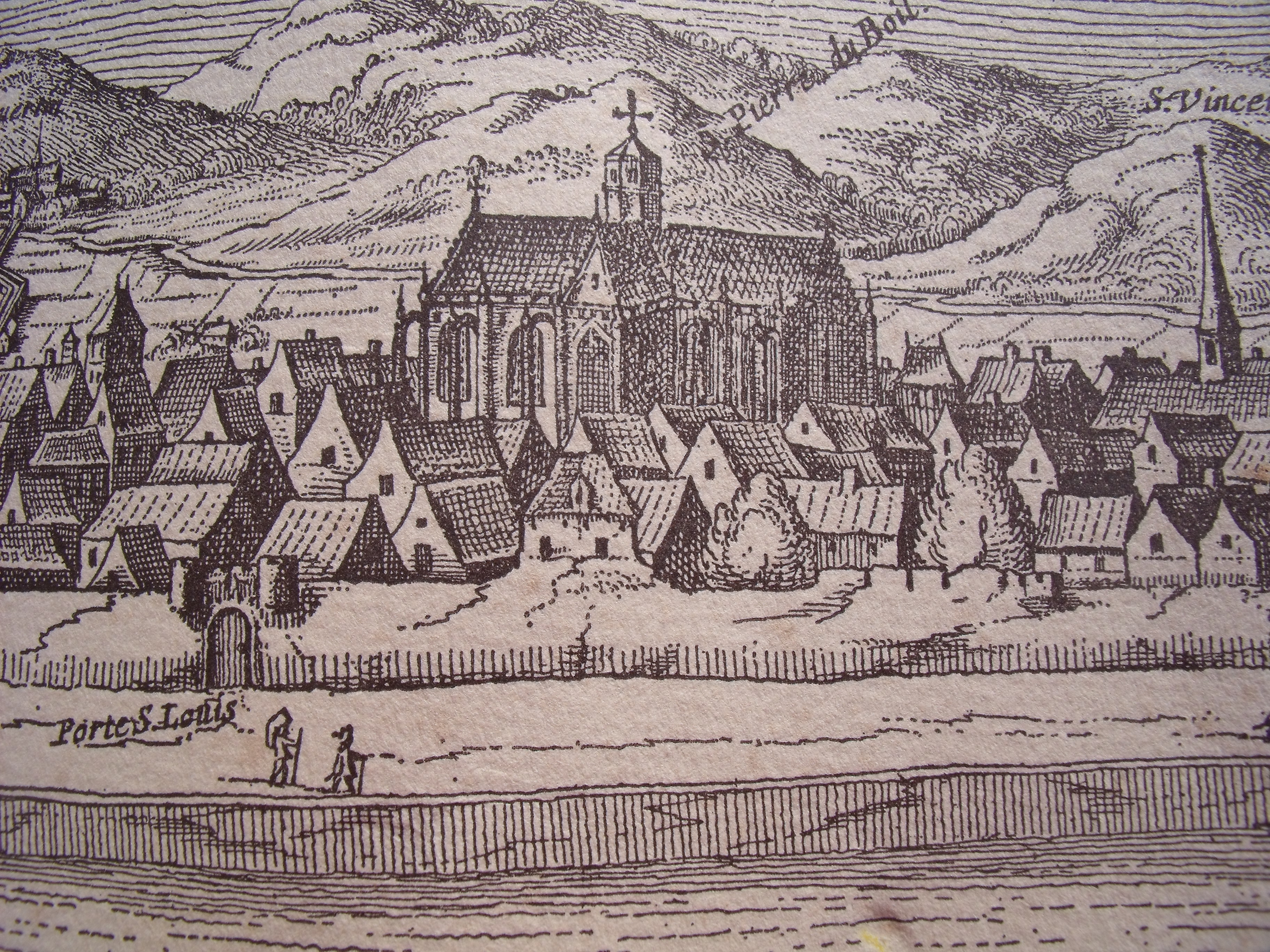 Rue Colbert, église saint pierre du boille, extrait de l'estampe gravé par monsieur LAES JANSZ VISSCHER en 1625 tiré d'un original sur vélin de 2.35 m sur 41 cm, propriété de desprez37